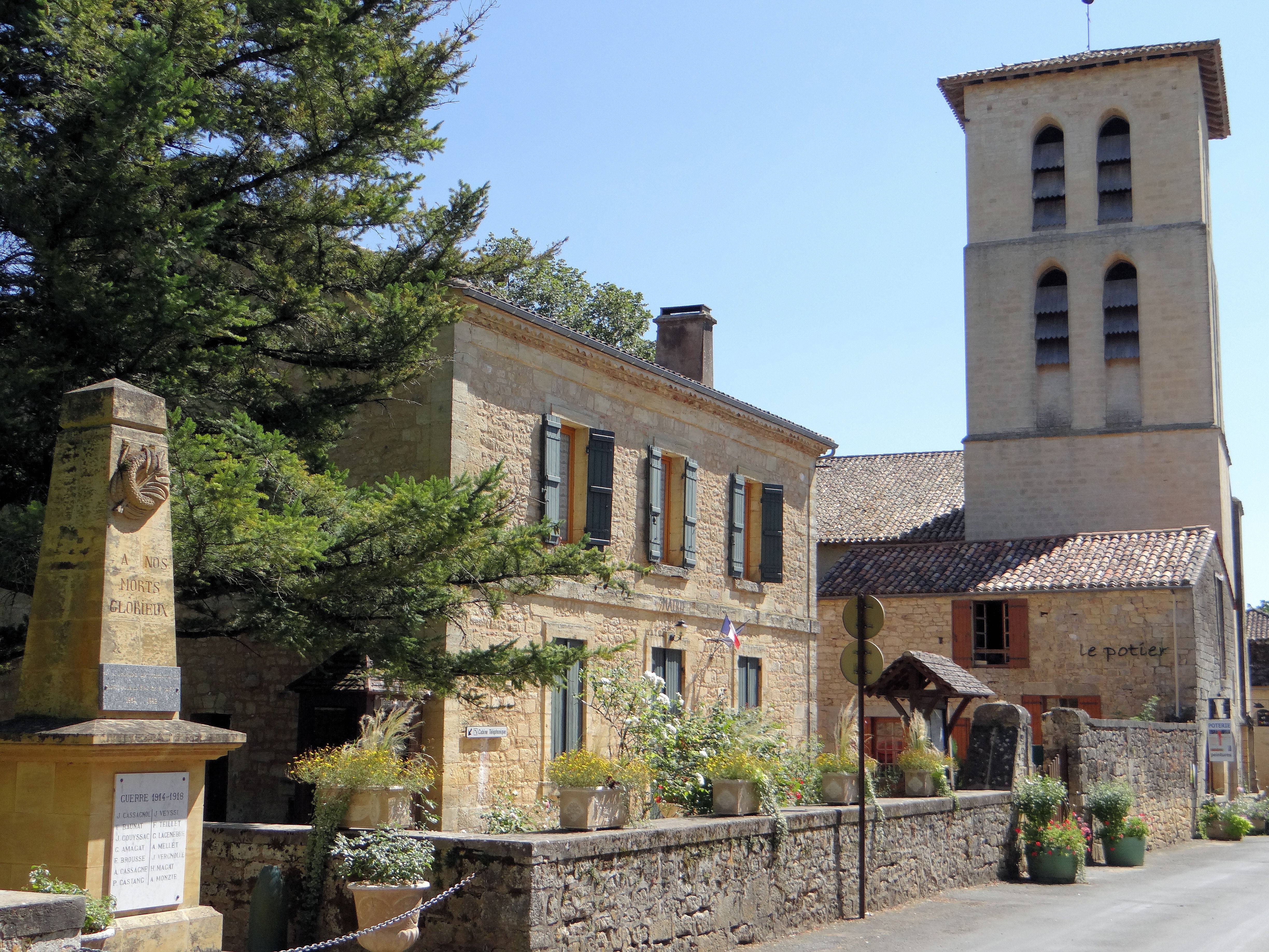 Molières (Dordogne) - Le monument aux morts, la mairie et la tour nor de l'église